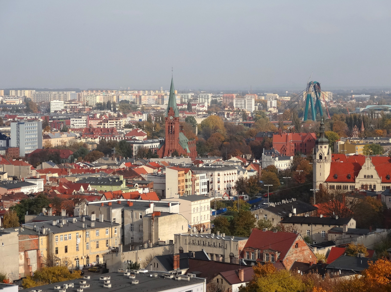 Widok z galerii widokowej na wieży ciśnień w Bydgoszczy (ul. Filarecka) w kierunku północnym i północno-wschodnim (Stare Miasto, wschodnie Śródmieście)